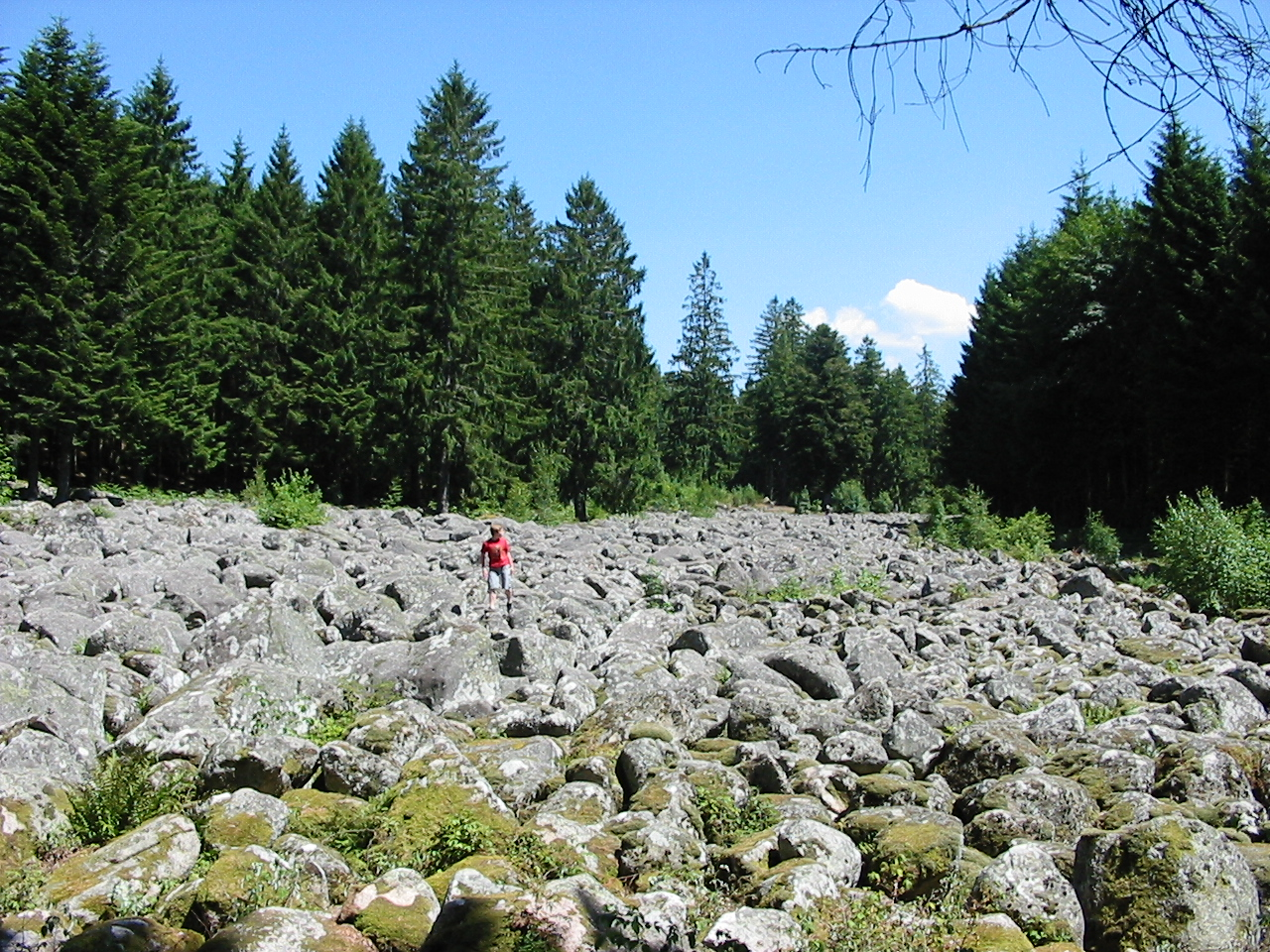 Le Champ de Roches sur les hauteurs de Barbey-Seroux, commune du département des Vosges.